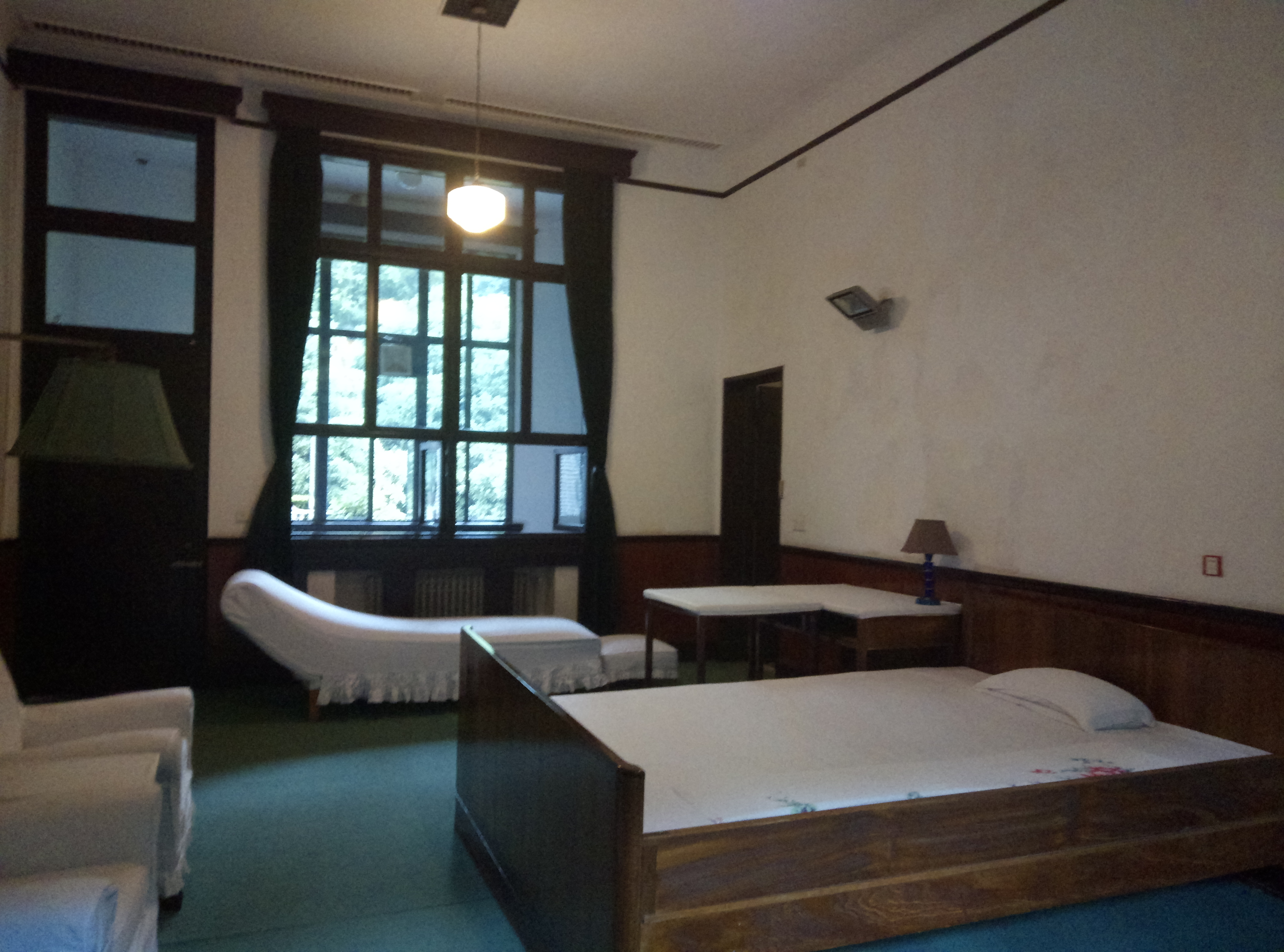 滴水洞一号 毛泽东卧室